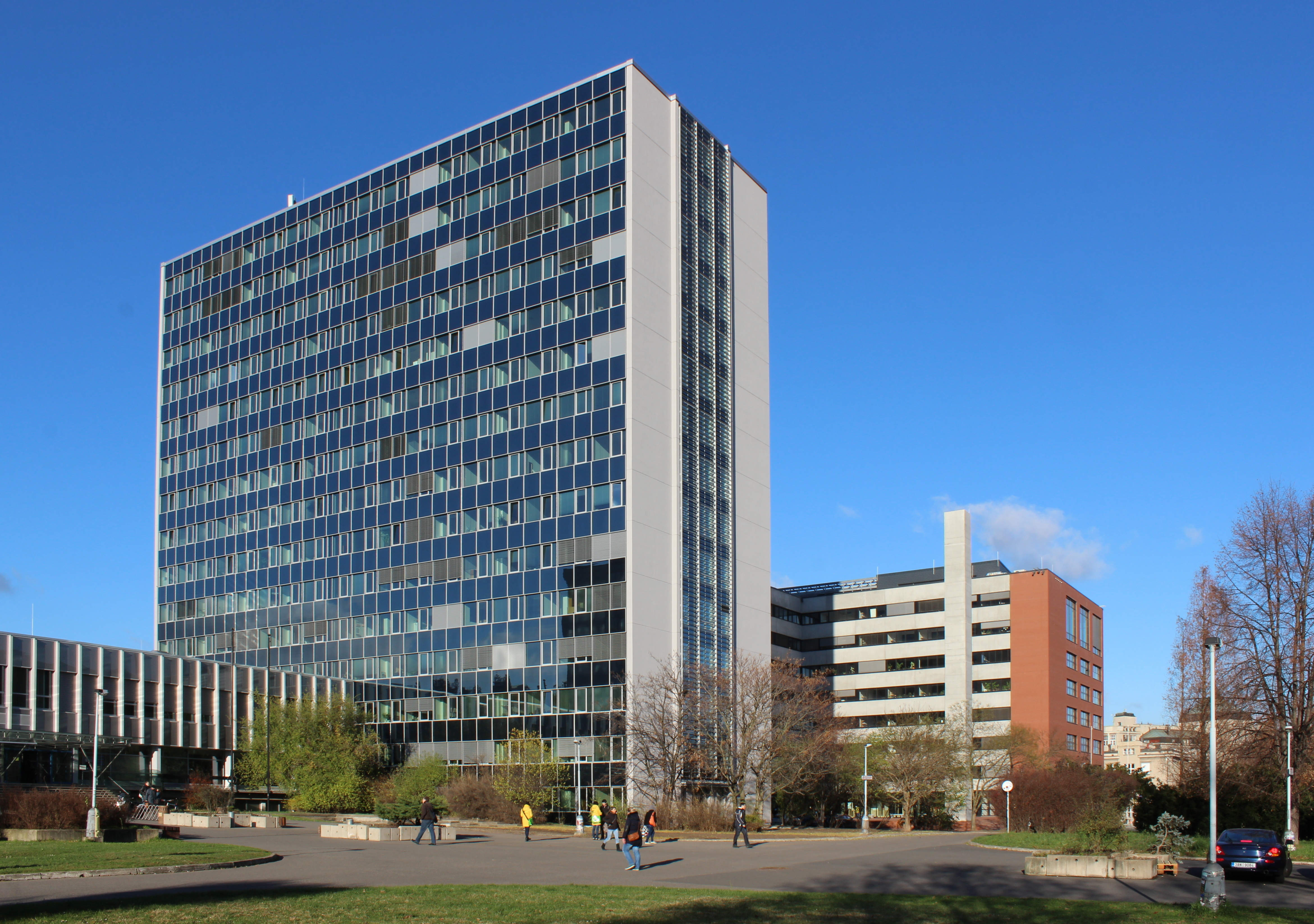 Nový obvodový plášť budovy A, České vysoké učení technické, stavební fakulta, Thákurova 7, Praha 6